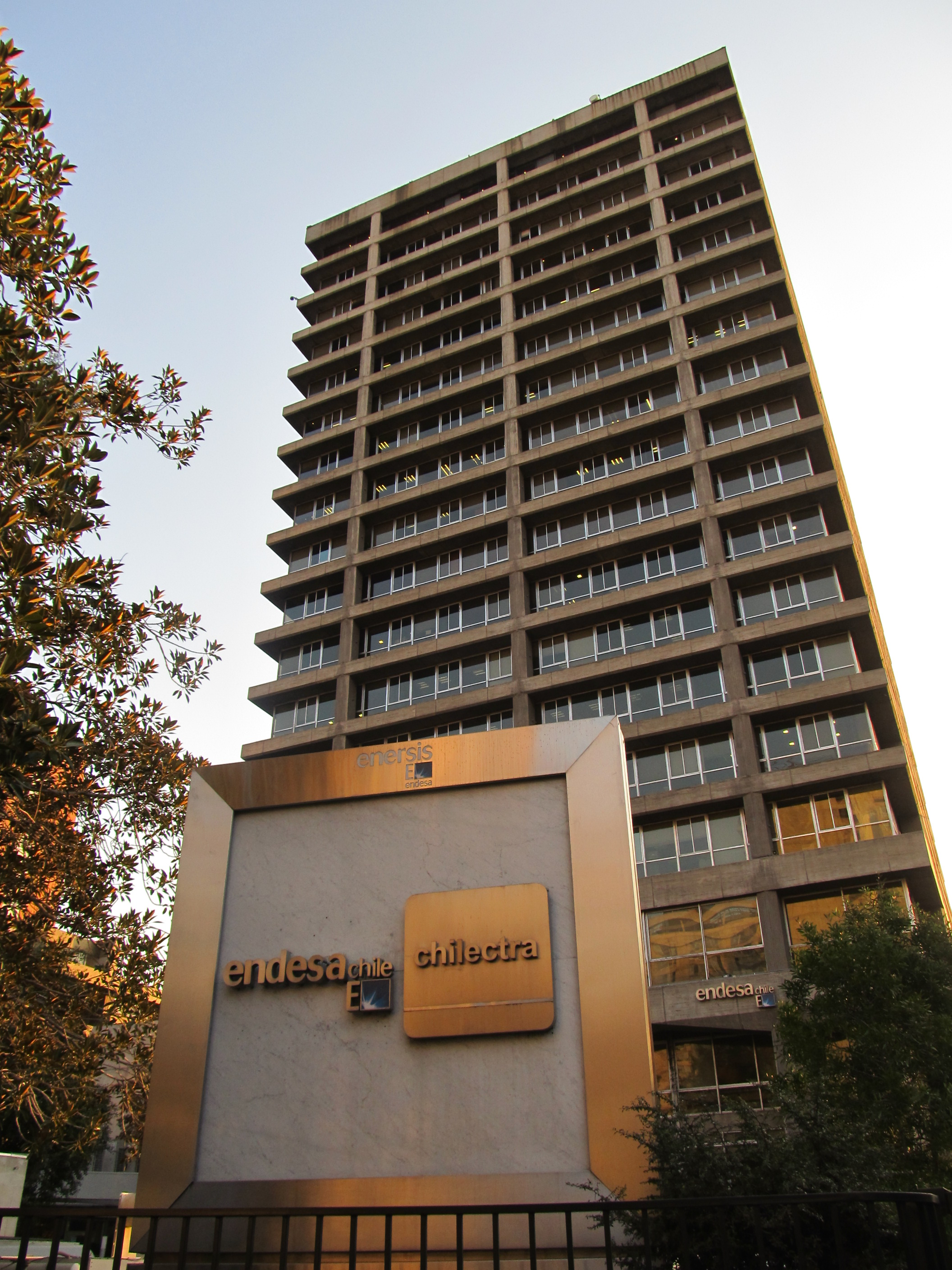 Edificio del grupo Enersis, Endesa Chile y Chilectra en Santiago de Chile.